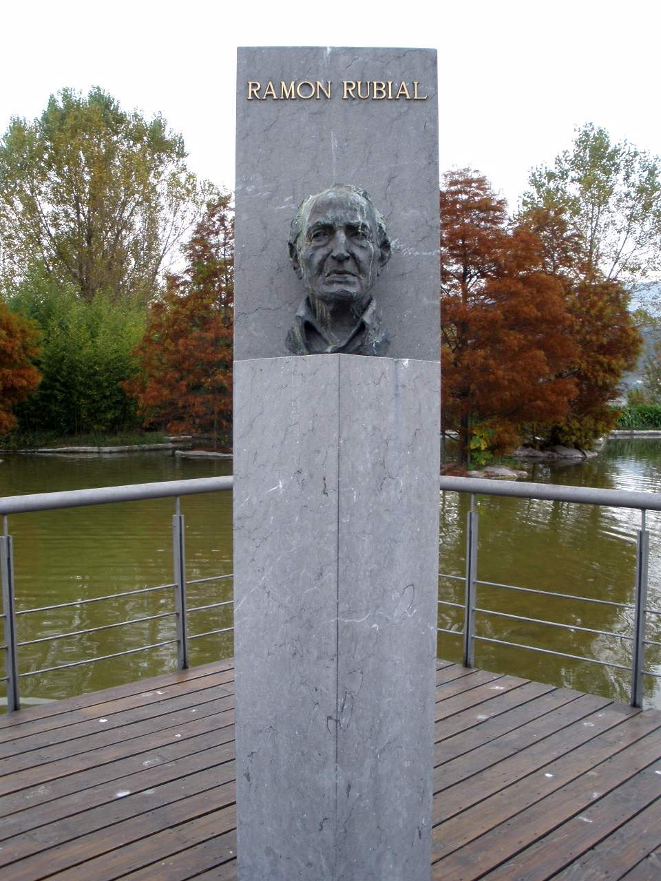 Jardín Botánico de Barakaldo (Bizkaia). Monumento a Ramón Rubial